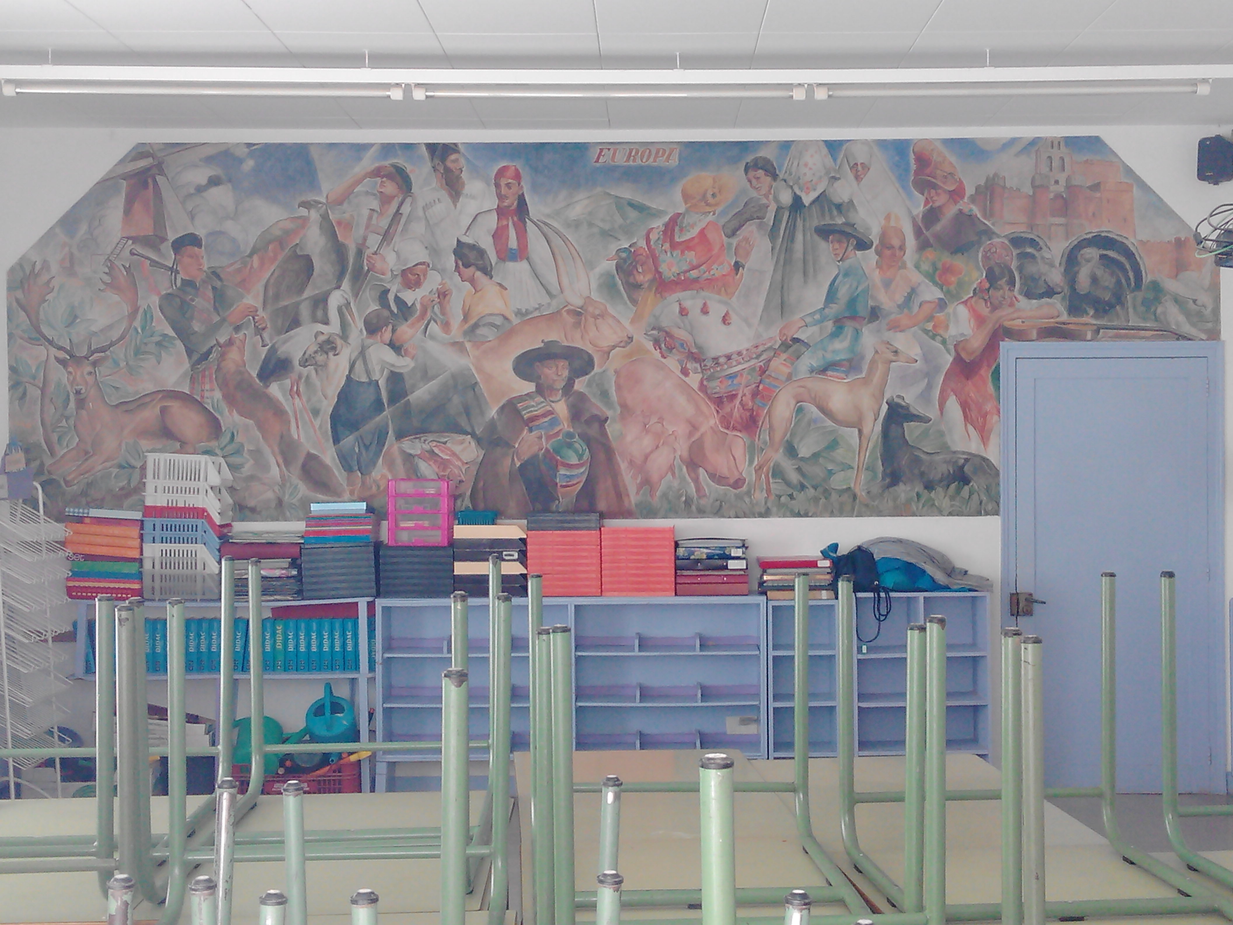 Escola Dr. Robert de Camprodon. Fresc "Europa", de la sèrie dels continents, realitzat per Josep Morell Macias. Edifici catalogat IPA 3845